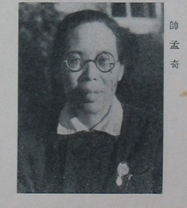 中文（台灣）: 中國人民政治協商會議第一屆全體會議代表